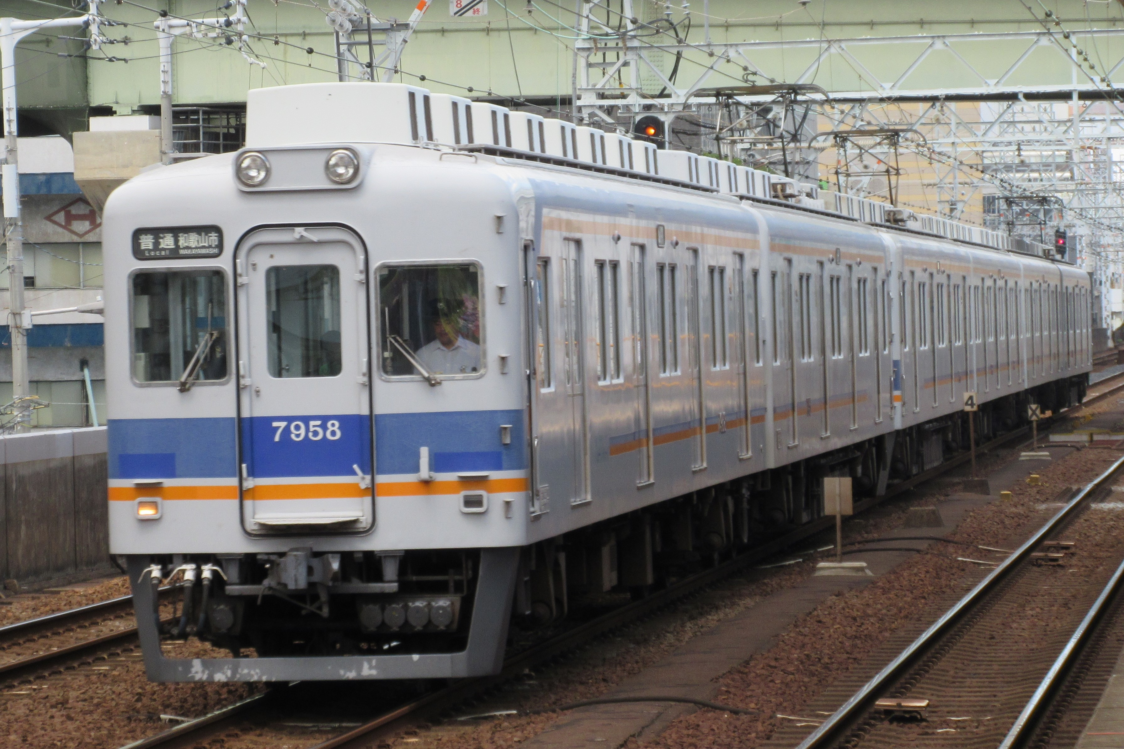 南海電鉄7958 (今宮戎駅にて)